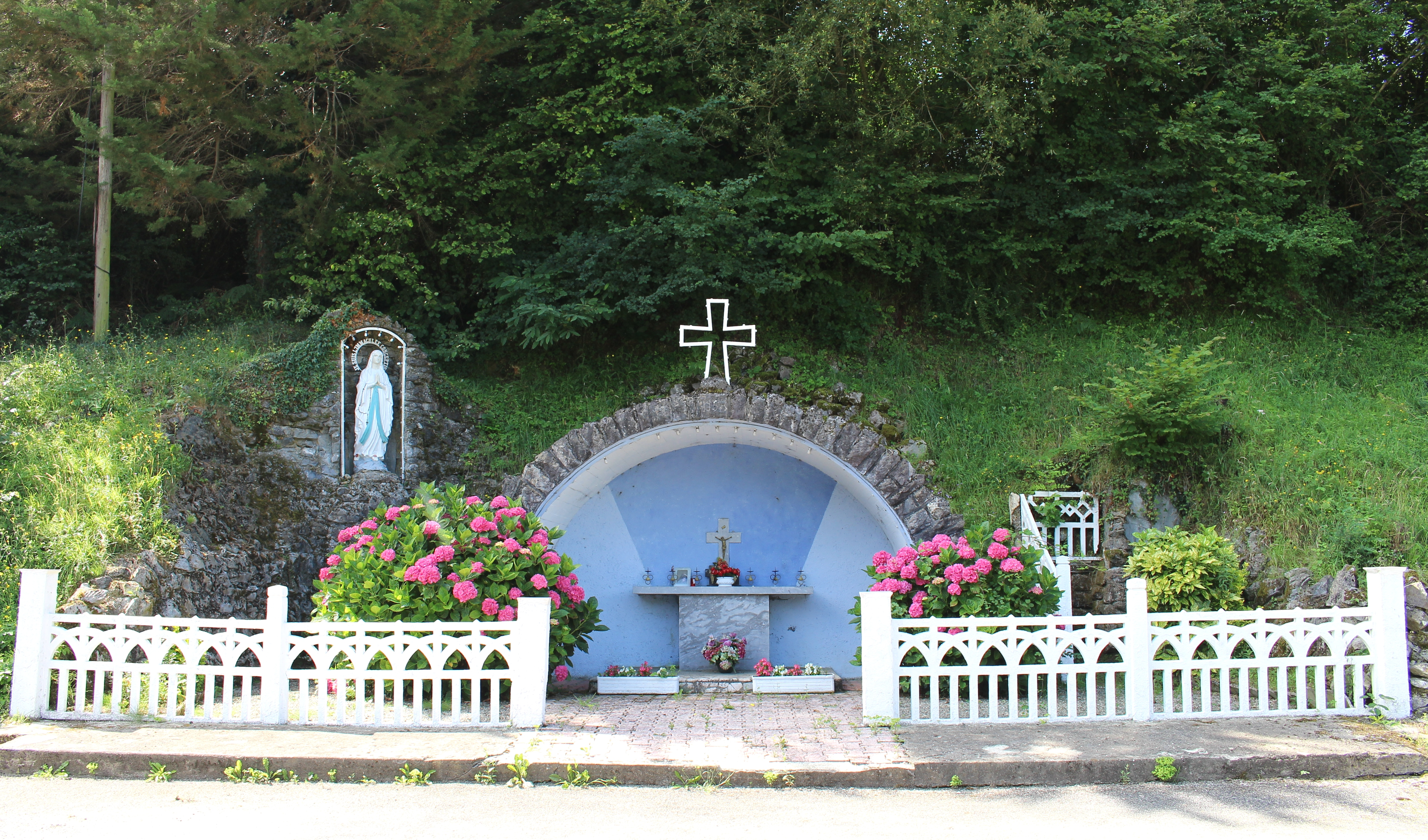 Oratoire Notre Dame de Lourdes de Montastruc (Hautes-Pyrénées)